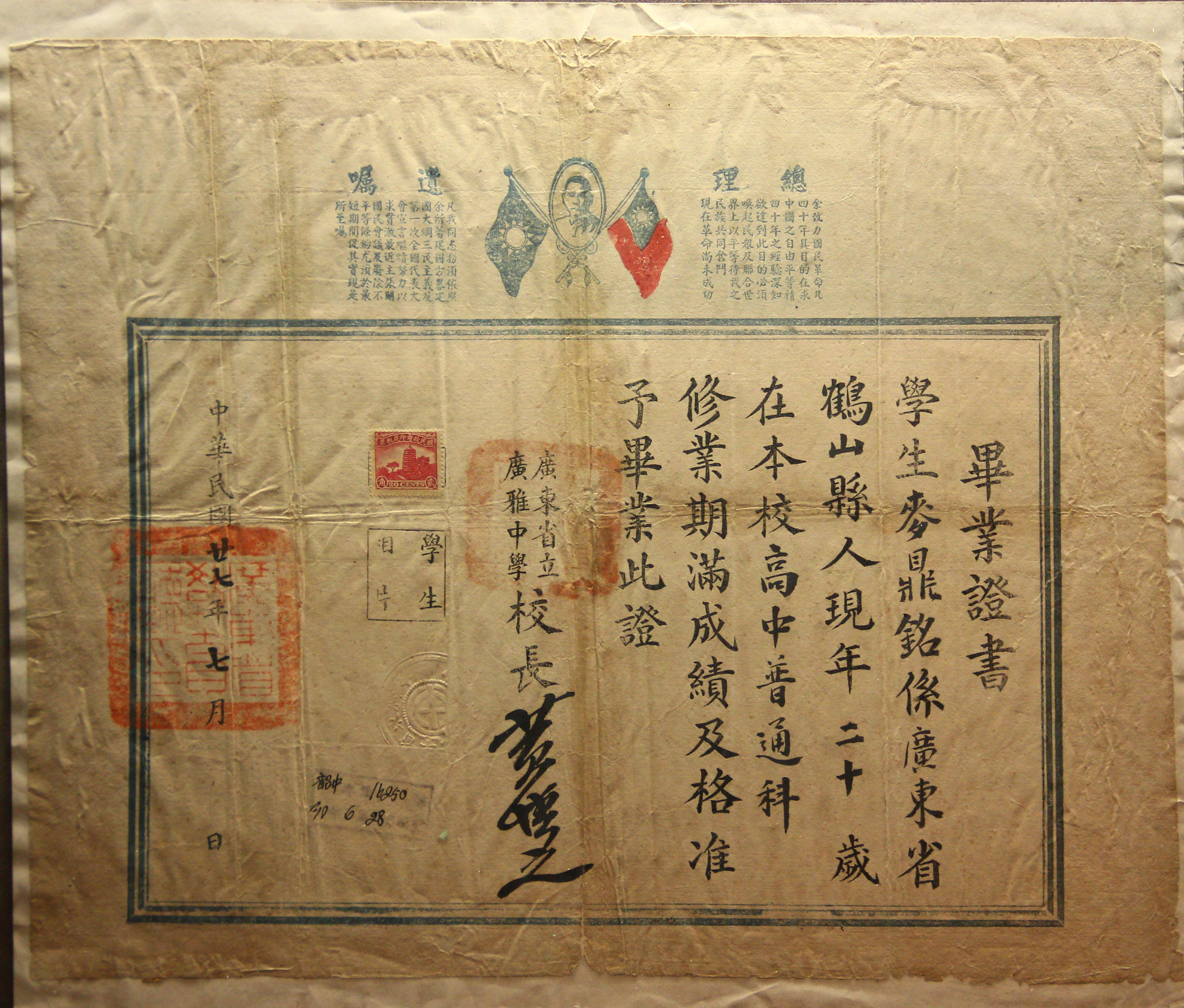 廣東省立廣雅中學畢業證書。展出於廣州近代史博物館。